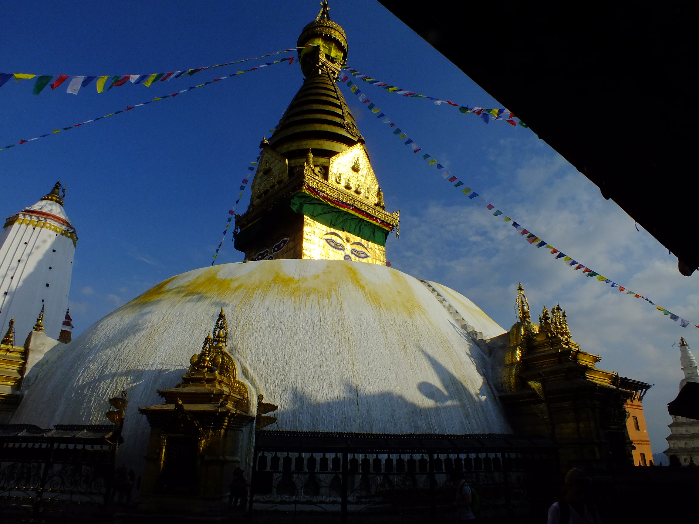 2015-03-08 Swayambhunath,Katmandu,Nepal,சுயம்புநாதர் கோயில்,スワヤンブナート